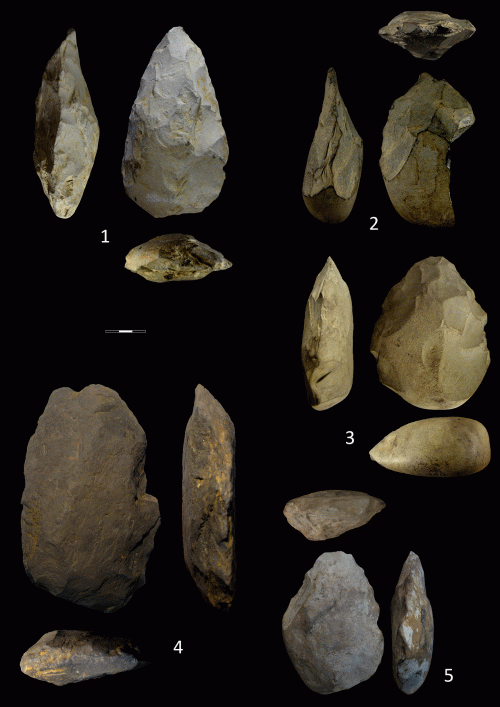 Uribe-Kostako bifazak